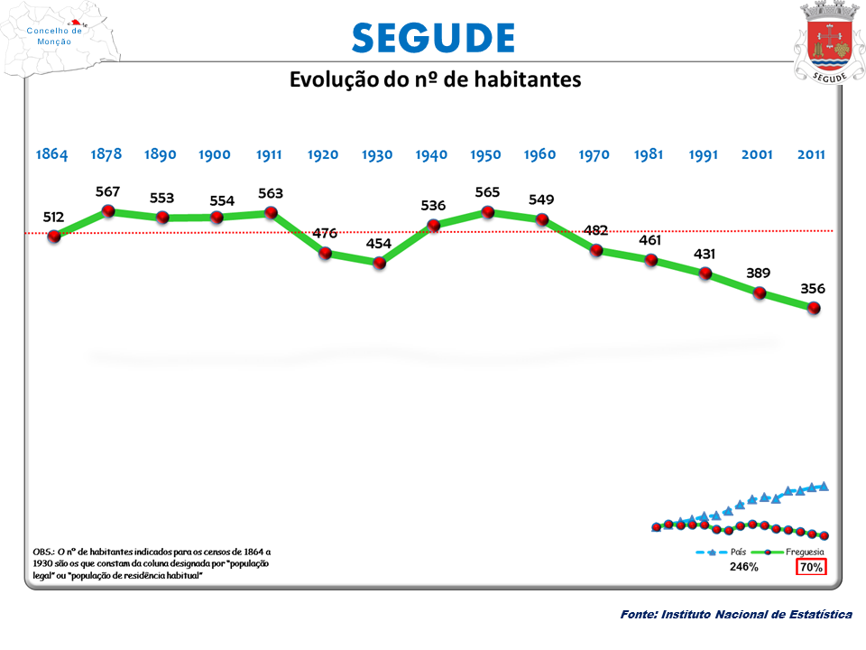 Censos 1864/2011